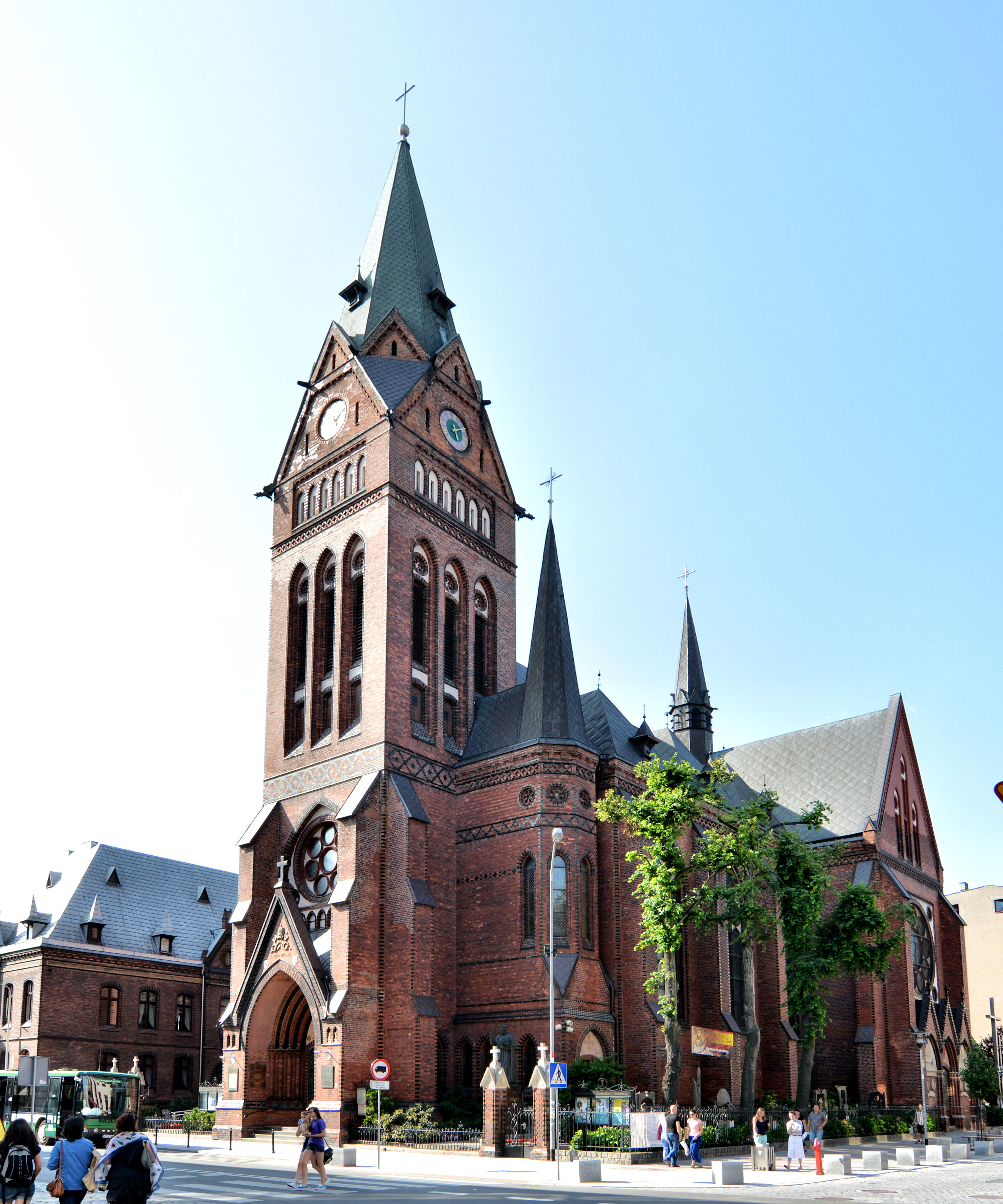 Bazylika św. Jana Chrzciciela w Szczecinie